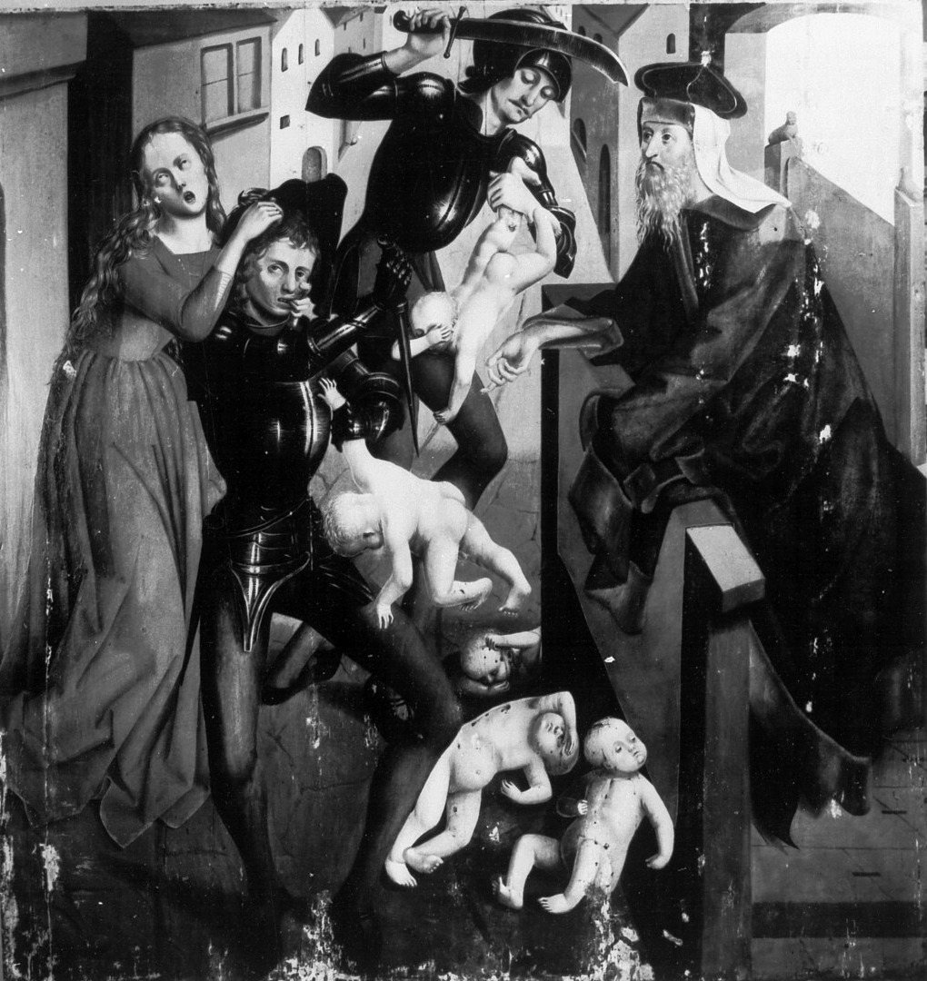 Bethlehemitischer Kindermord, Tempera auf Tannen-Holz, 101,5 x 98,8 cm. Germanisches Nationalmuseum Nürnberg, Inv.-Nr. Gm 1126